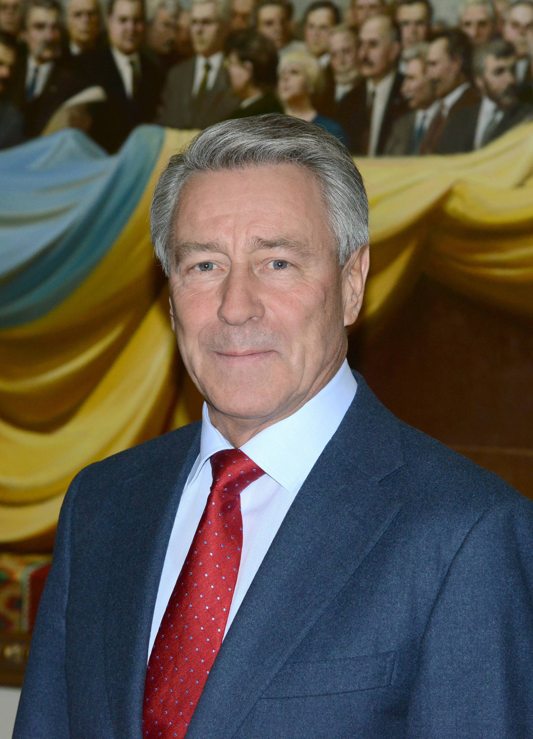 Кириленко Иван Григорьевич,фото Чуприна Вадим. А 2016 год